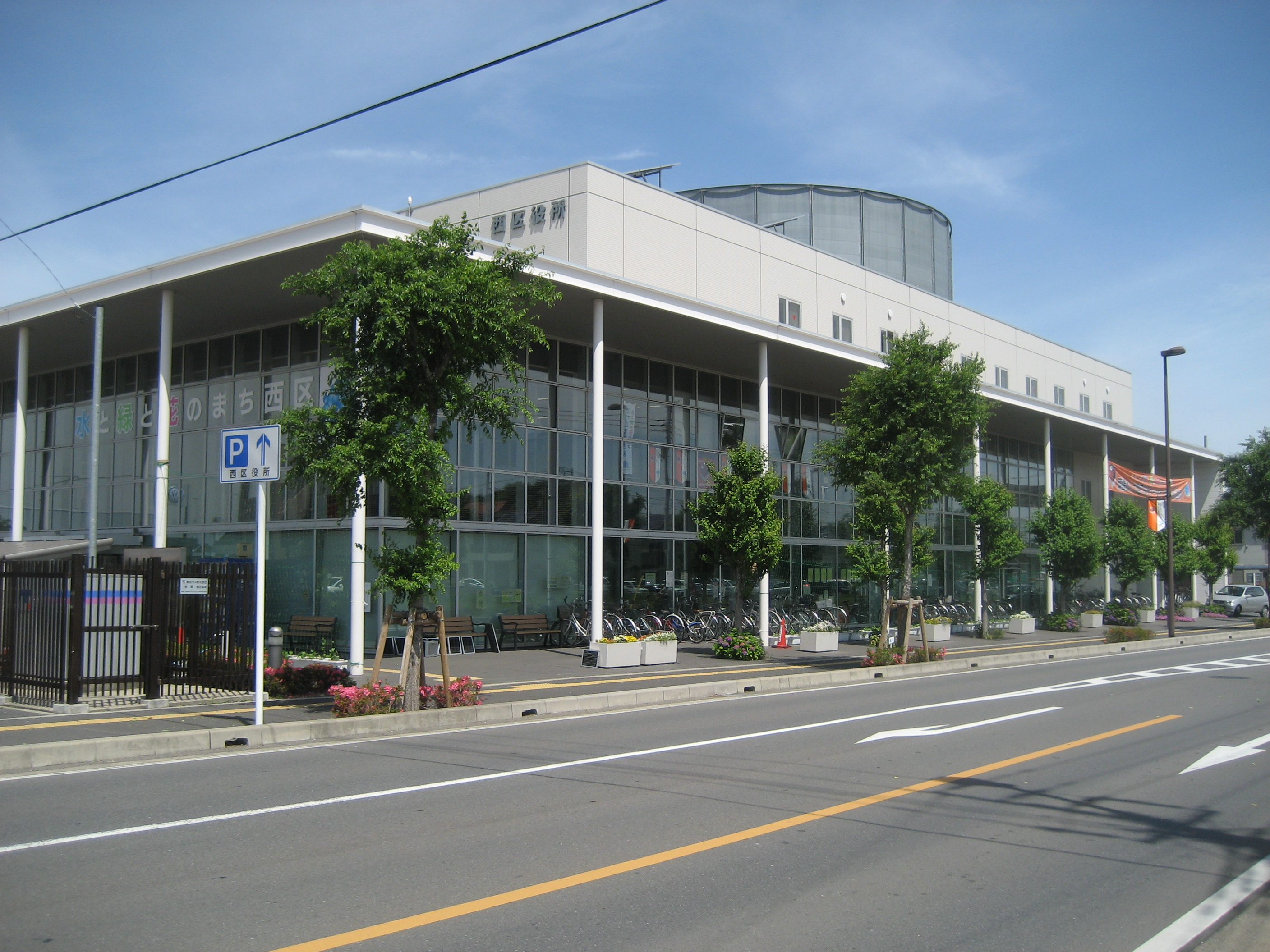 さいたま市西区役所庁舎（建物東側から撮影）